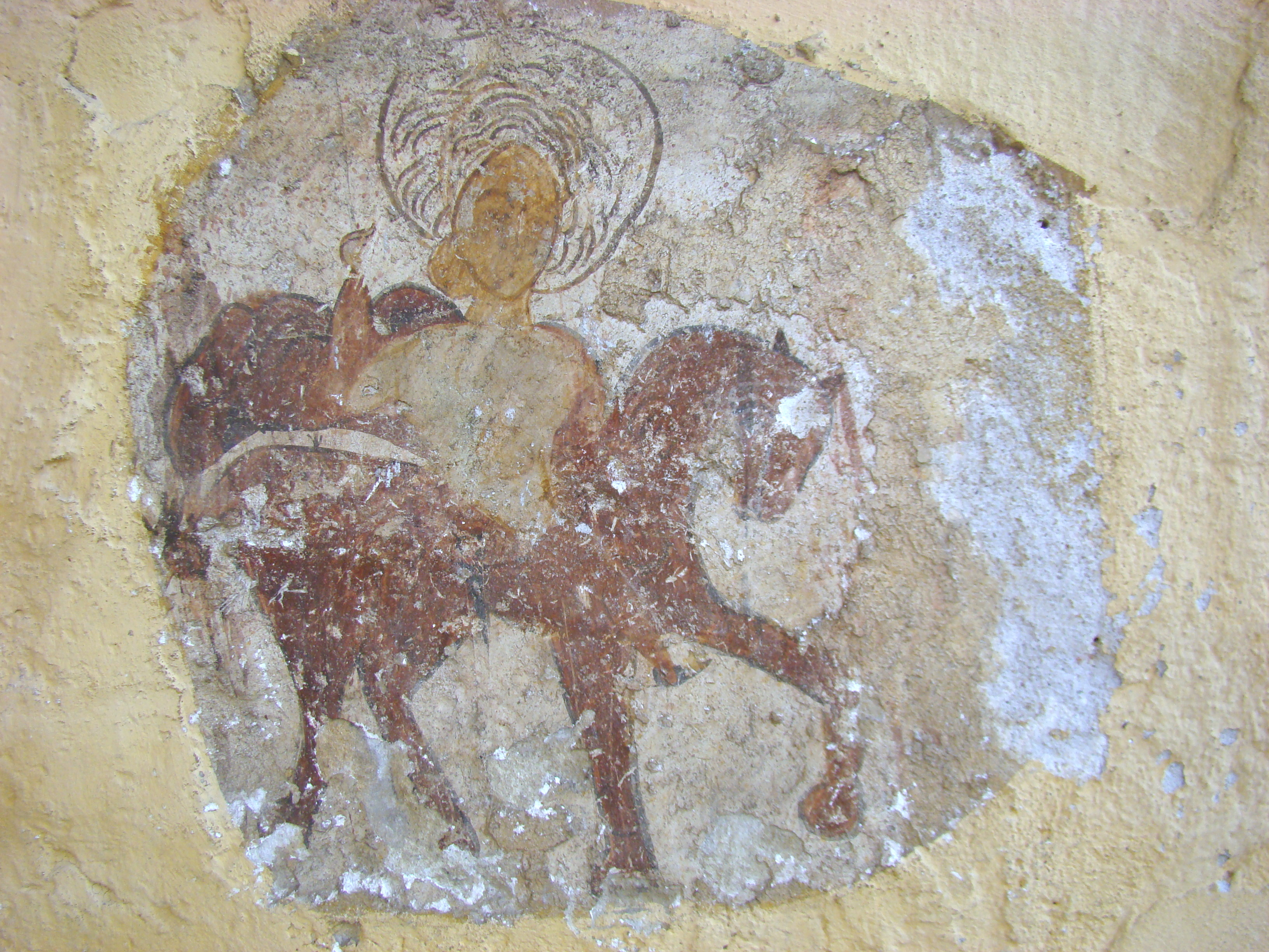 Biserica „Sfântul Prooroc Ilie”, sat Peșteana; comuna Densuș